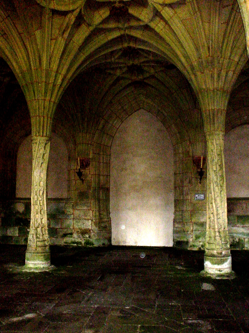 Kloster Oseira, Kapitelsaal